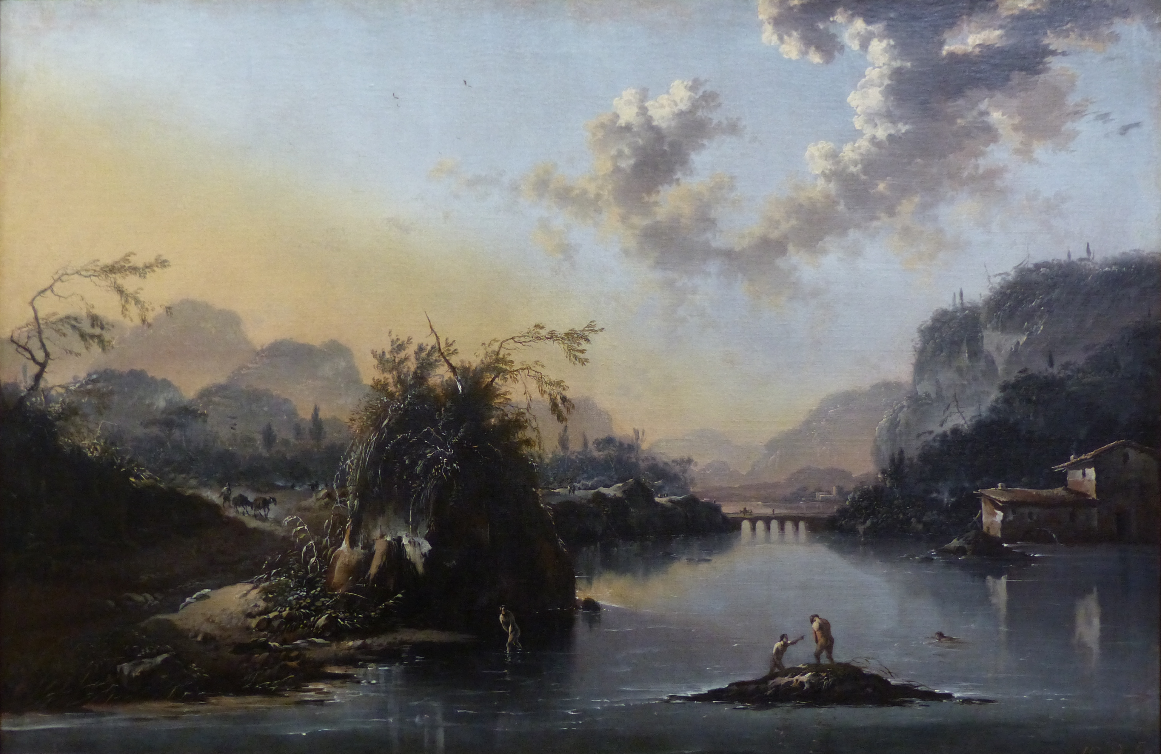 Paysage aux baigneurs